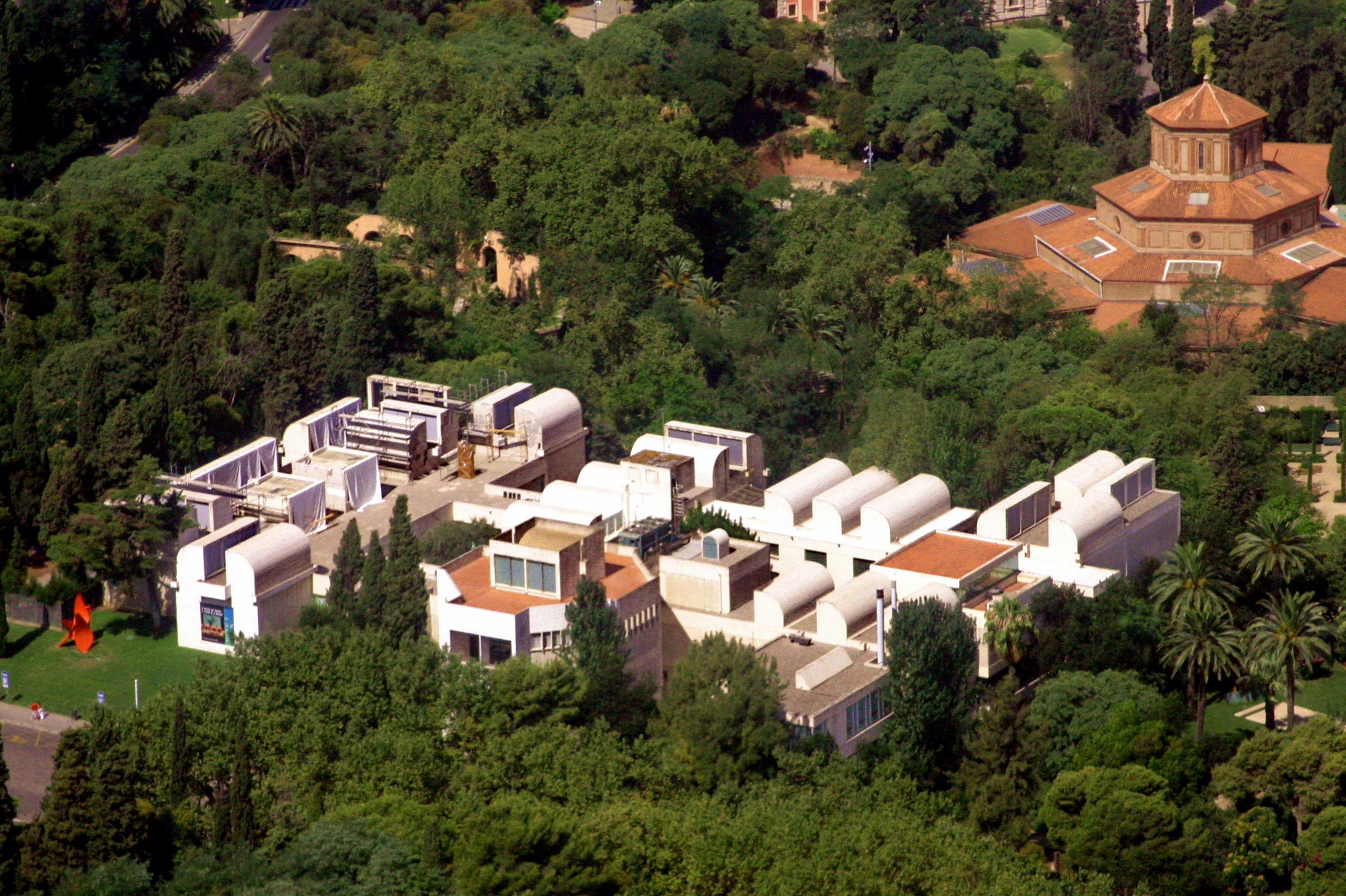 Vista aèria de la Fundació Miró obra de Josep Lluís Sert i López (Barcelona)